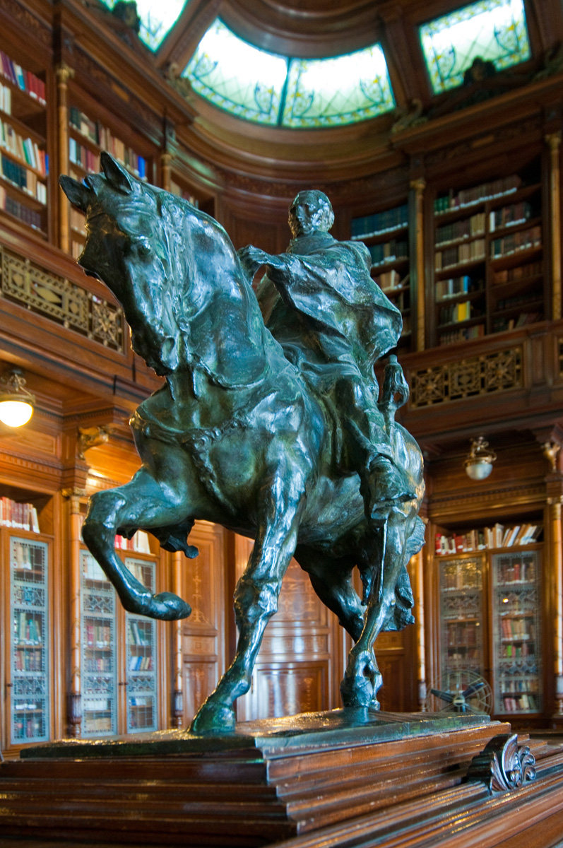 Palacio Legislativo. Ubicada en el departamento de Montevideo